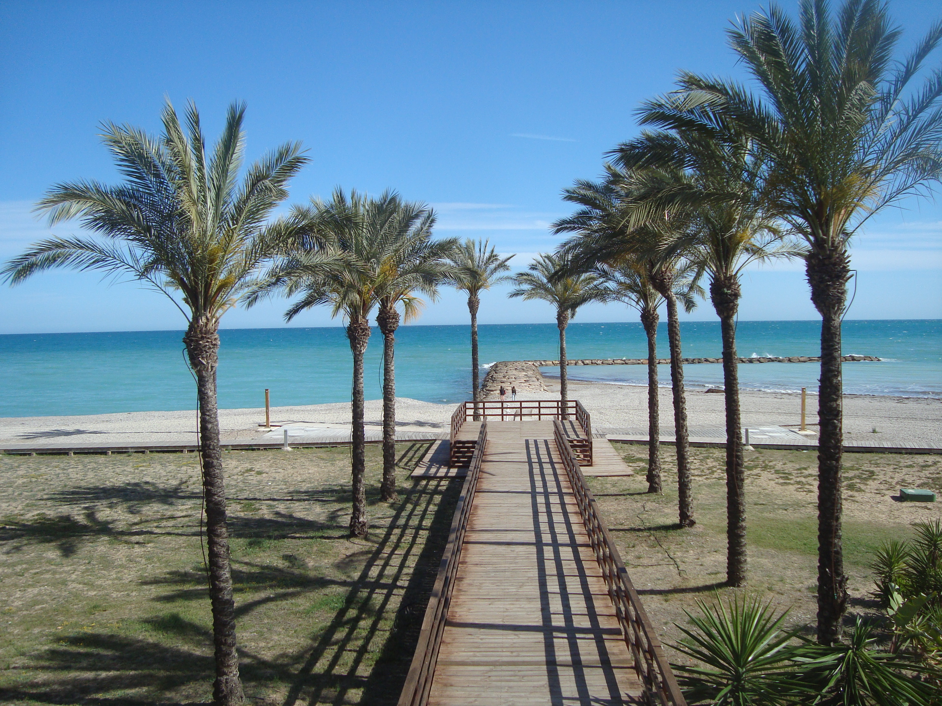 Platja dels Terrers (Benicàssim) This is a a photo of a beach in the Land of Valencia, Spain, with id: PL-1426